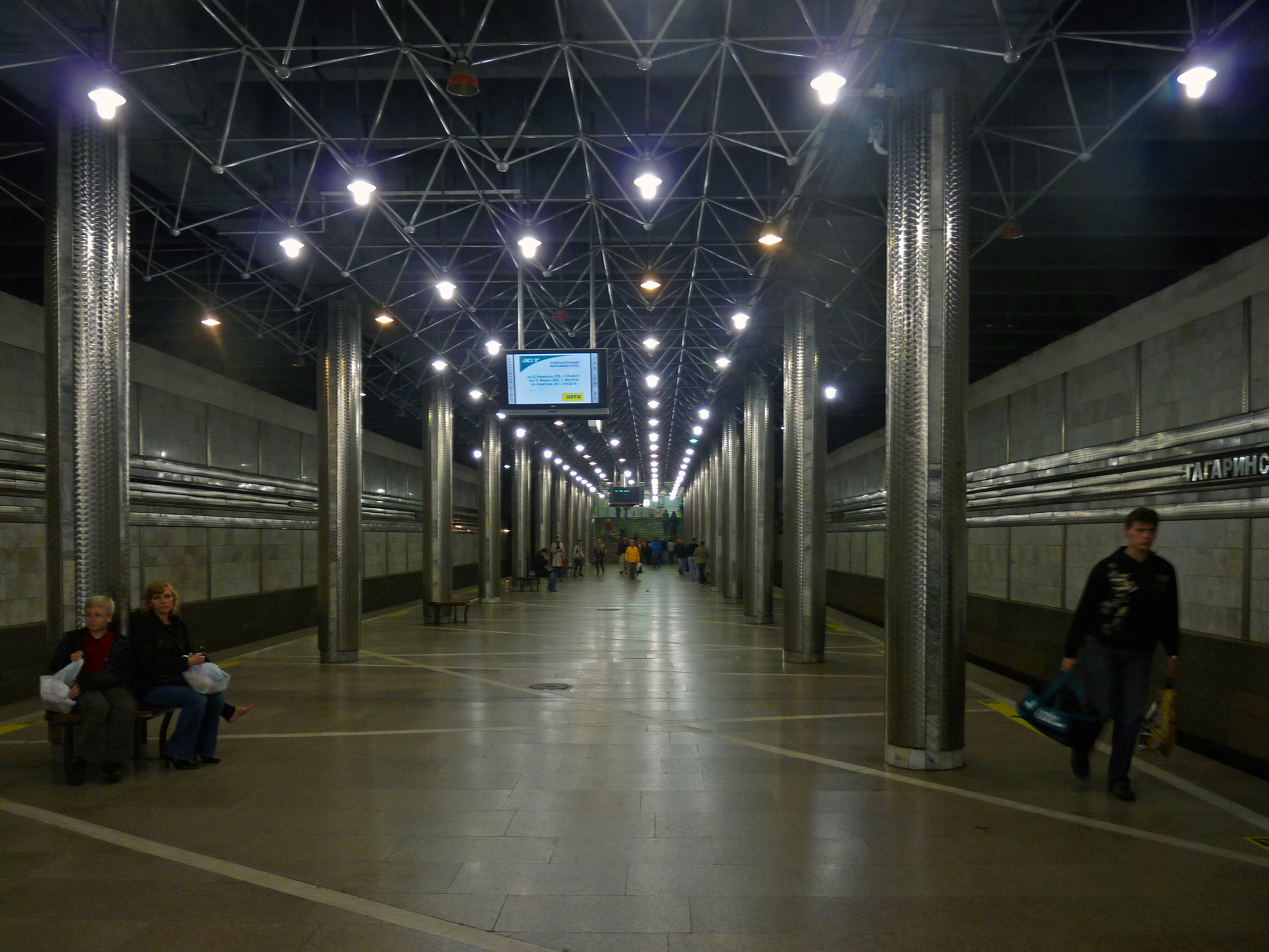 Станция Гагаринская Новосибирского метрополитена